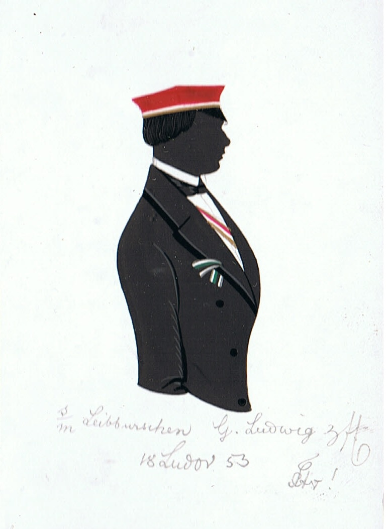 Schattenriss von Georg Ludwig.